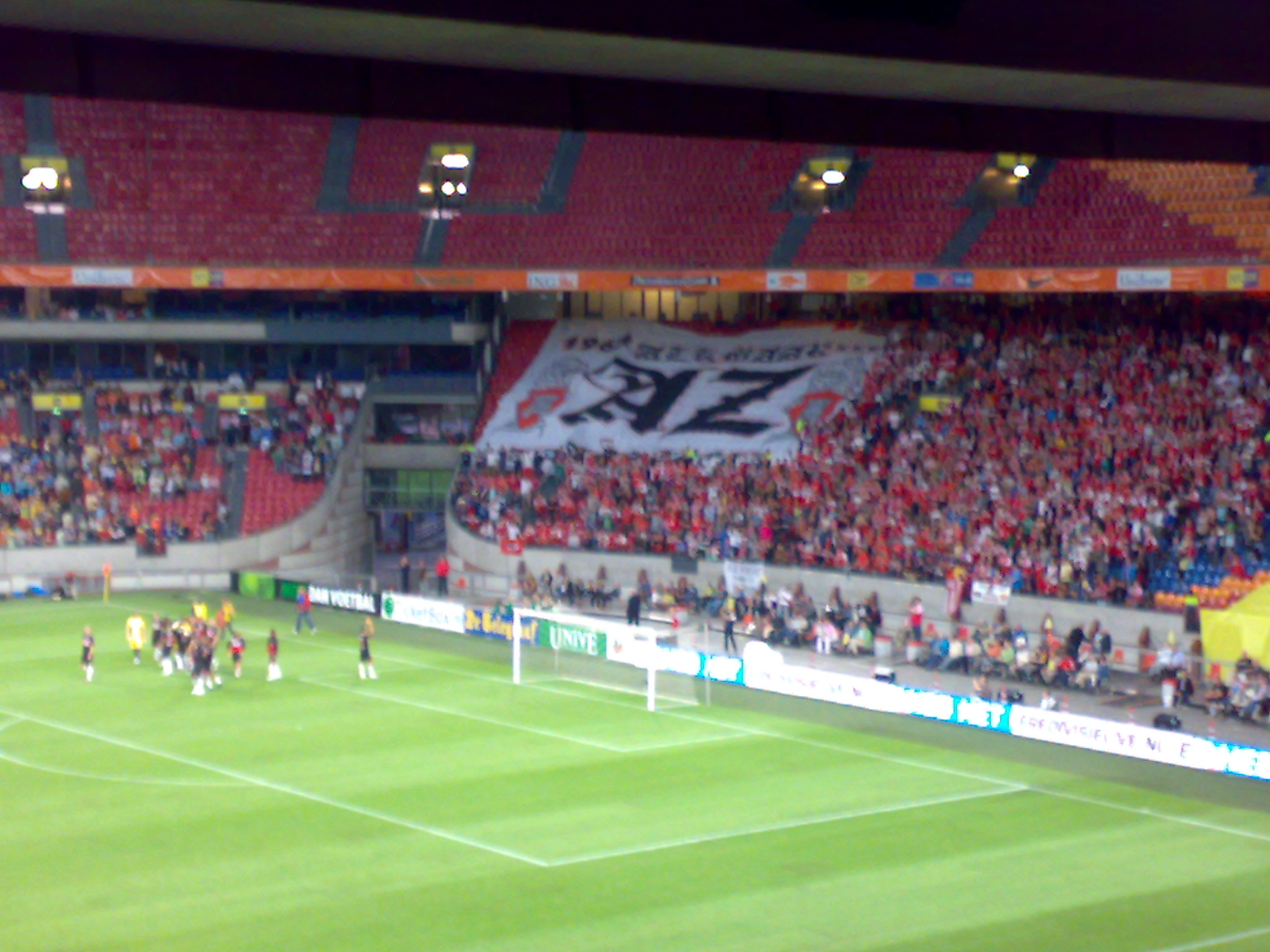 Het AZ publiek bij Heerenveen-AZ na de wedstrijd om de Johan Cruijff Schaal in 2009